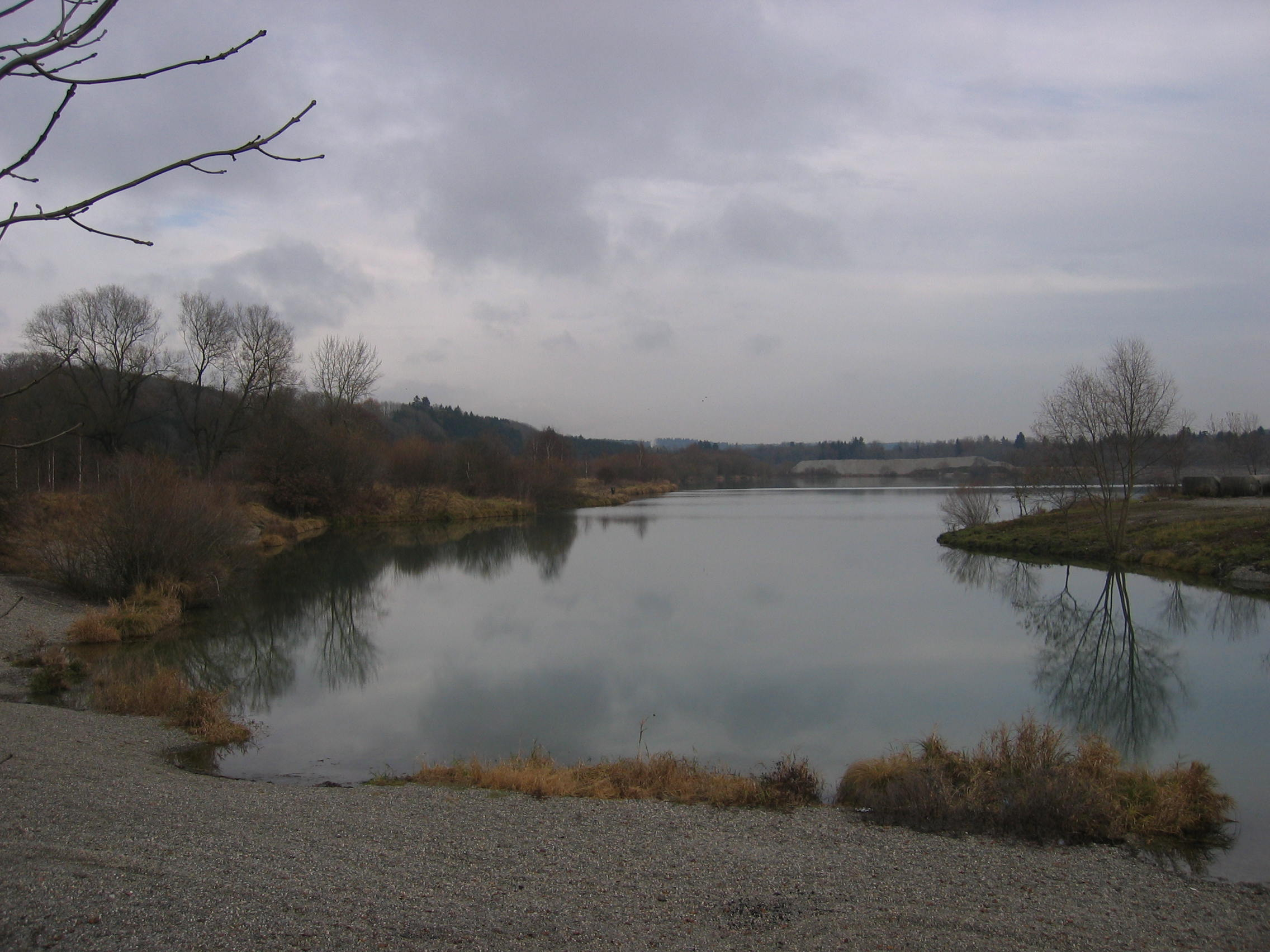 Baggersee Lutz bei Krauchenwies, Landkreis Sigmaringen